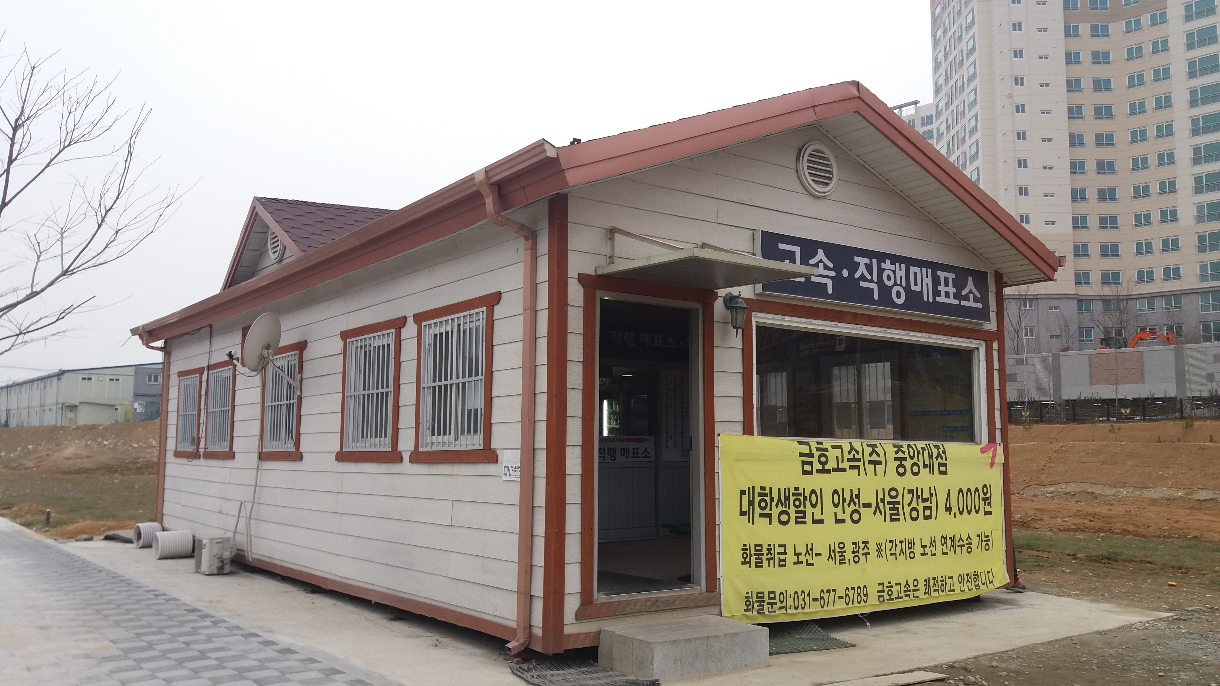 안성중앙대학교정류장